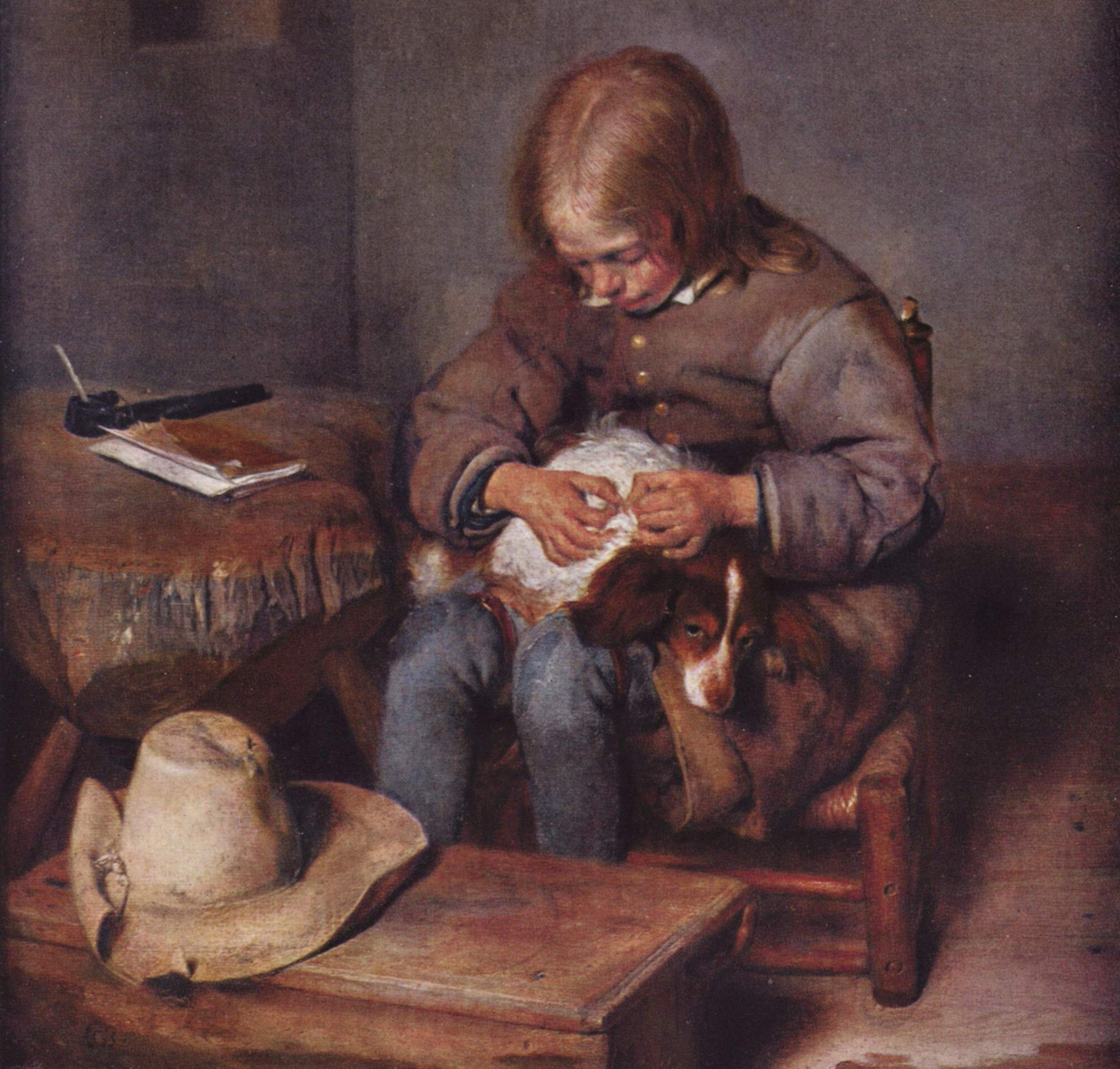 cropped